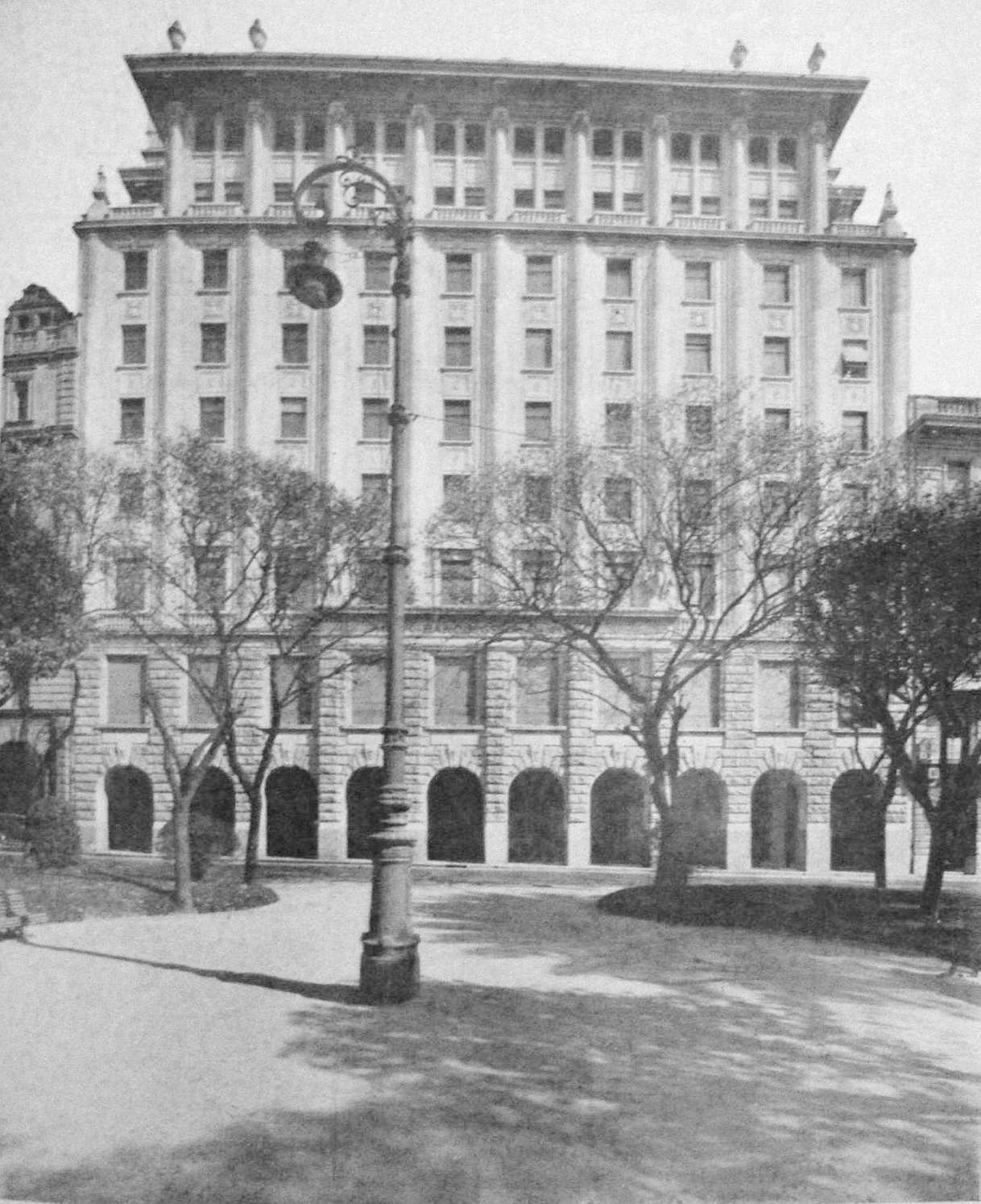 Frente sobre la Avenida Leandro N. Alem del edificio del Banco Germánico de América del Sur (hoy Ministerio del Interior).